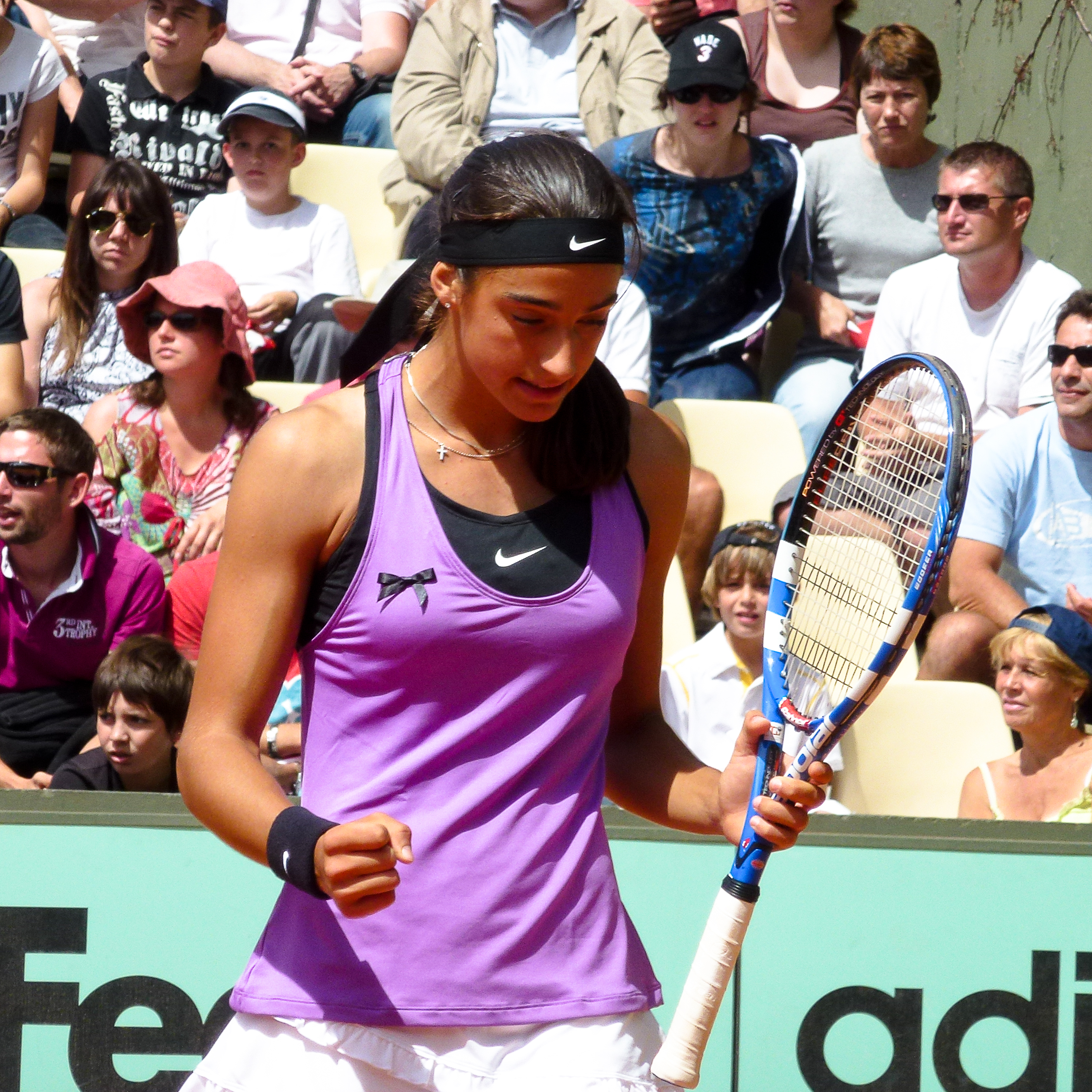 Caroline Garcia (FRA) def. Zuzana Ondraskova (CZE) Roland Garros 2011 - mardi 24 mai - 1er tour